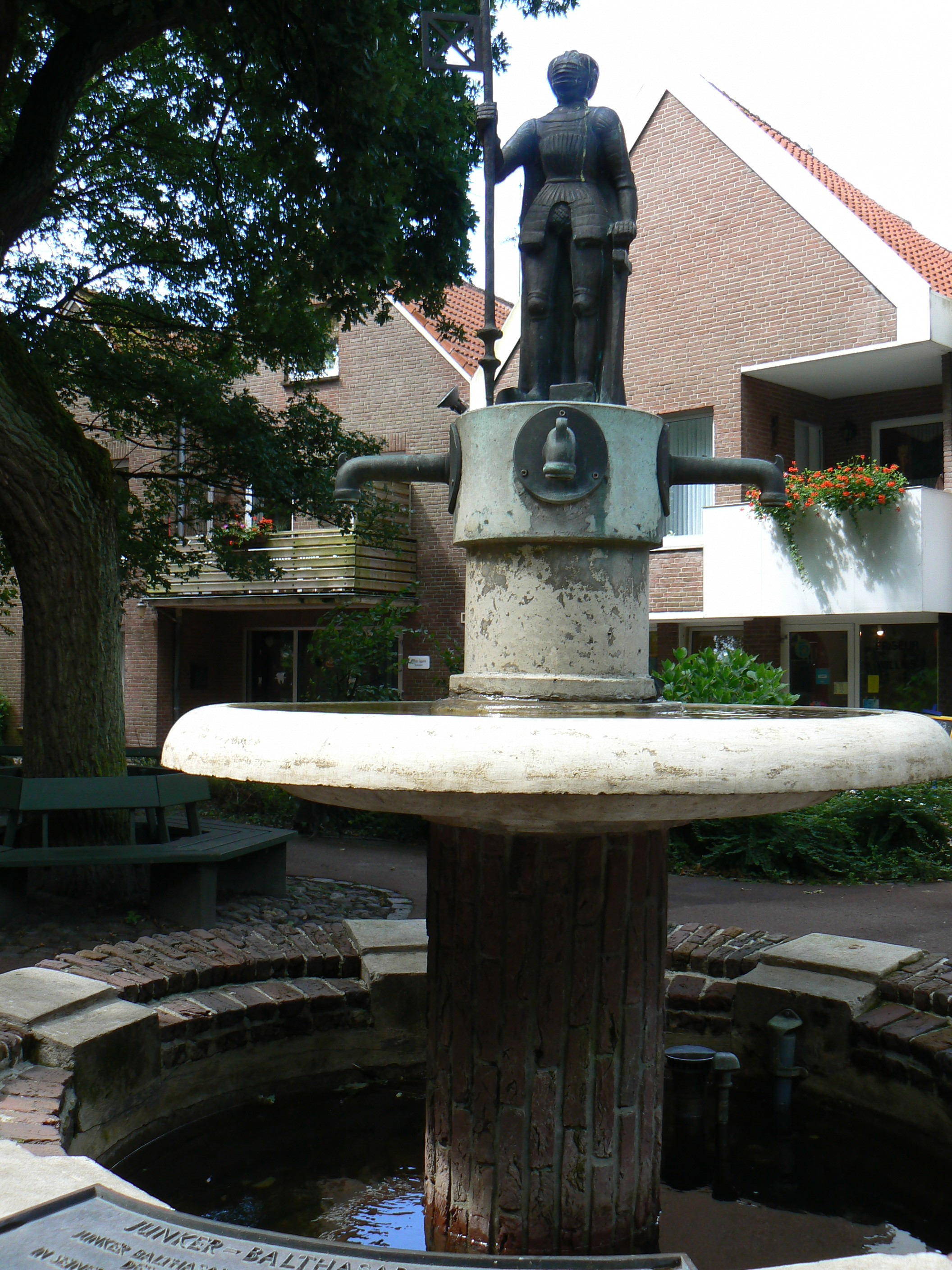 Junker Balthasar Fountain in Esens/Germany